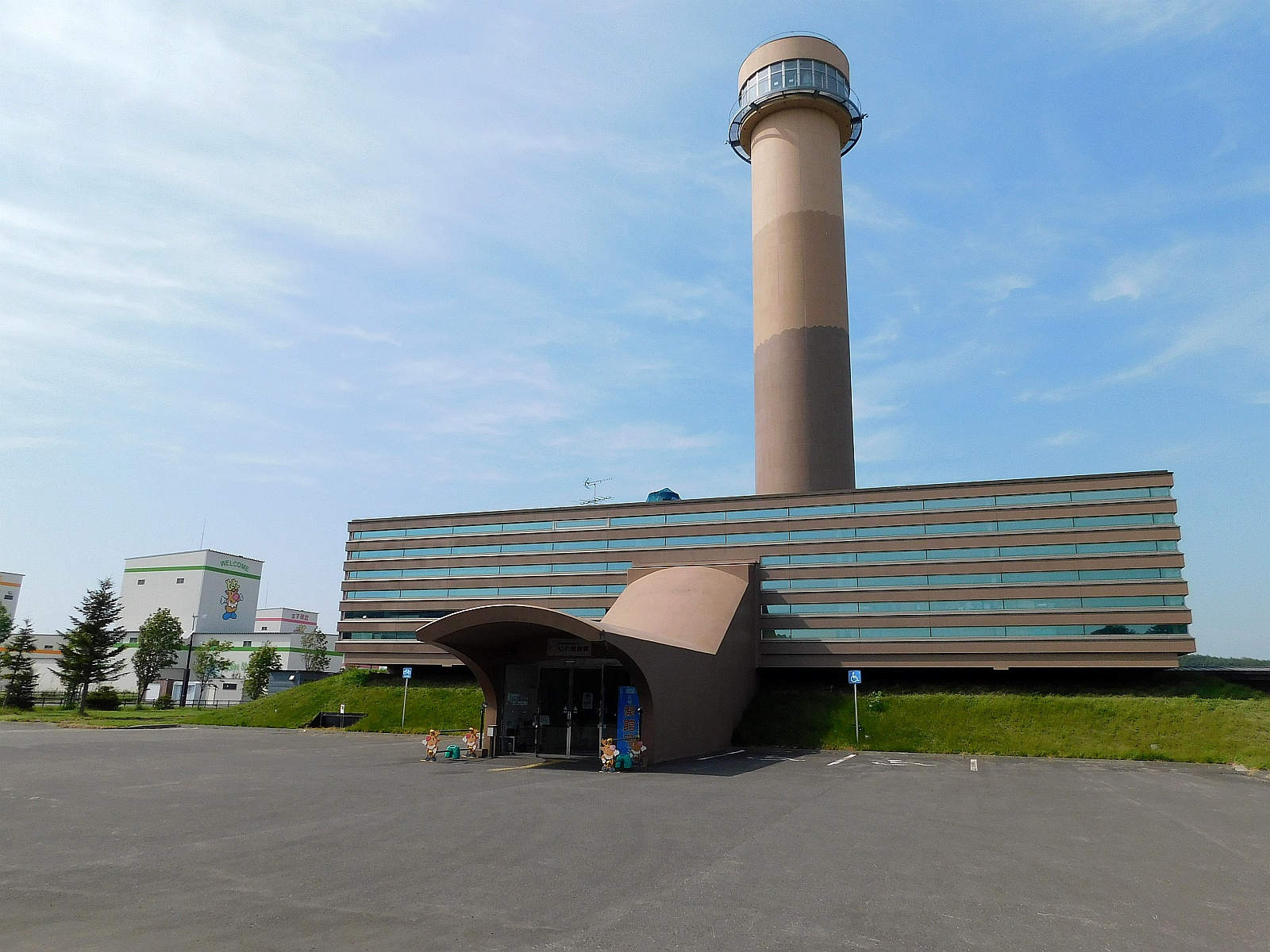 北海道天塩郡幌延町にある幌延深地層研究センターのゆめ地創館外観。展望タワーの外壁は、センターの地下にある「勇知層」「声問層」「稚内層」をイメージした3色で塗られている。左奥に見える建物が地下施設群であり、緑色が東立坑、橙色が西立坑、桃色が換気立坑。